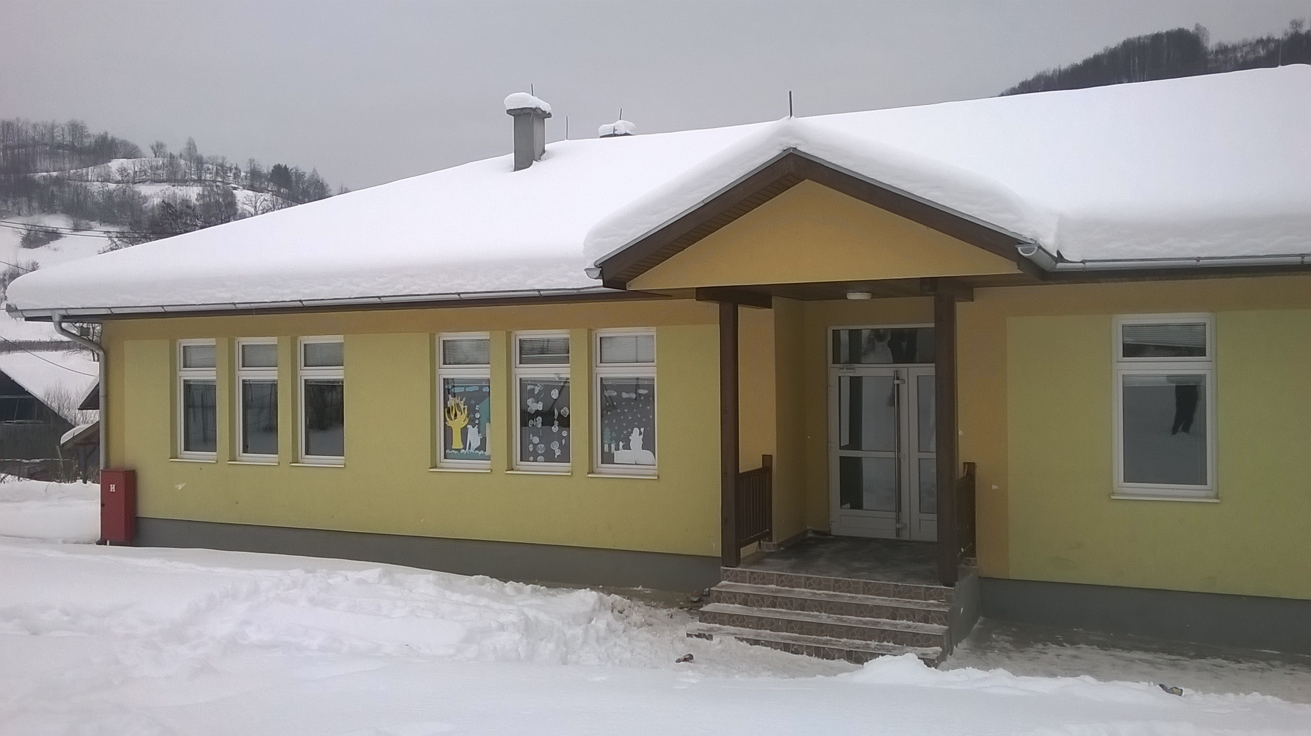 Škola u Osonici